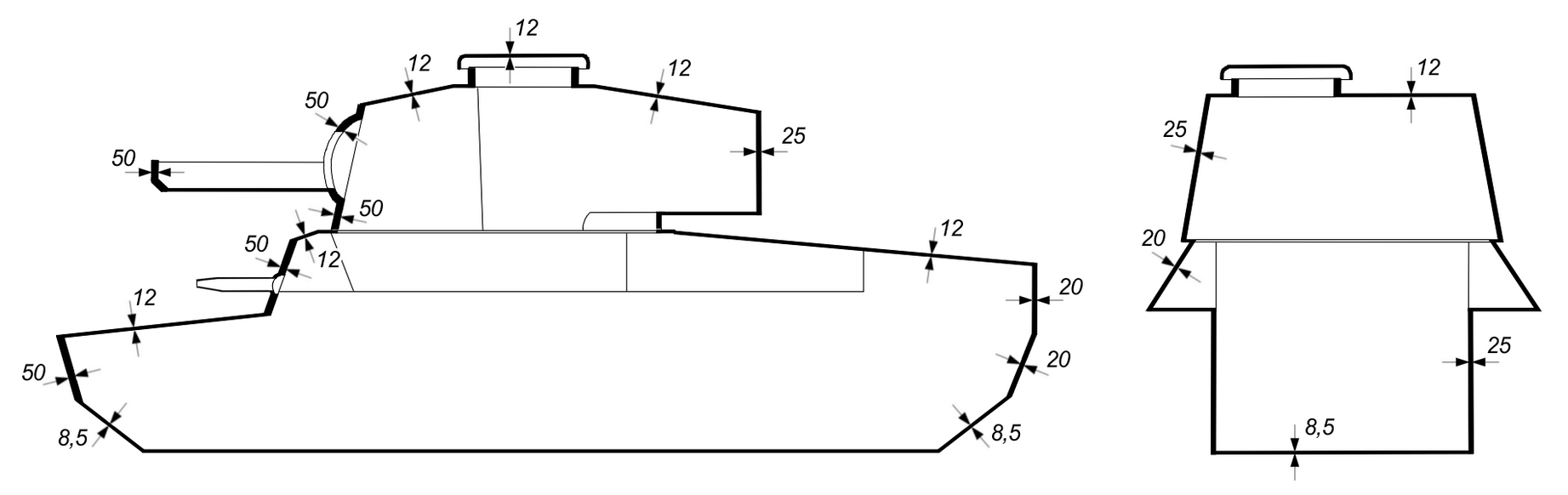 схема бронирования танка «Чи-Ну»